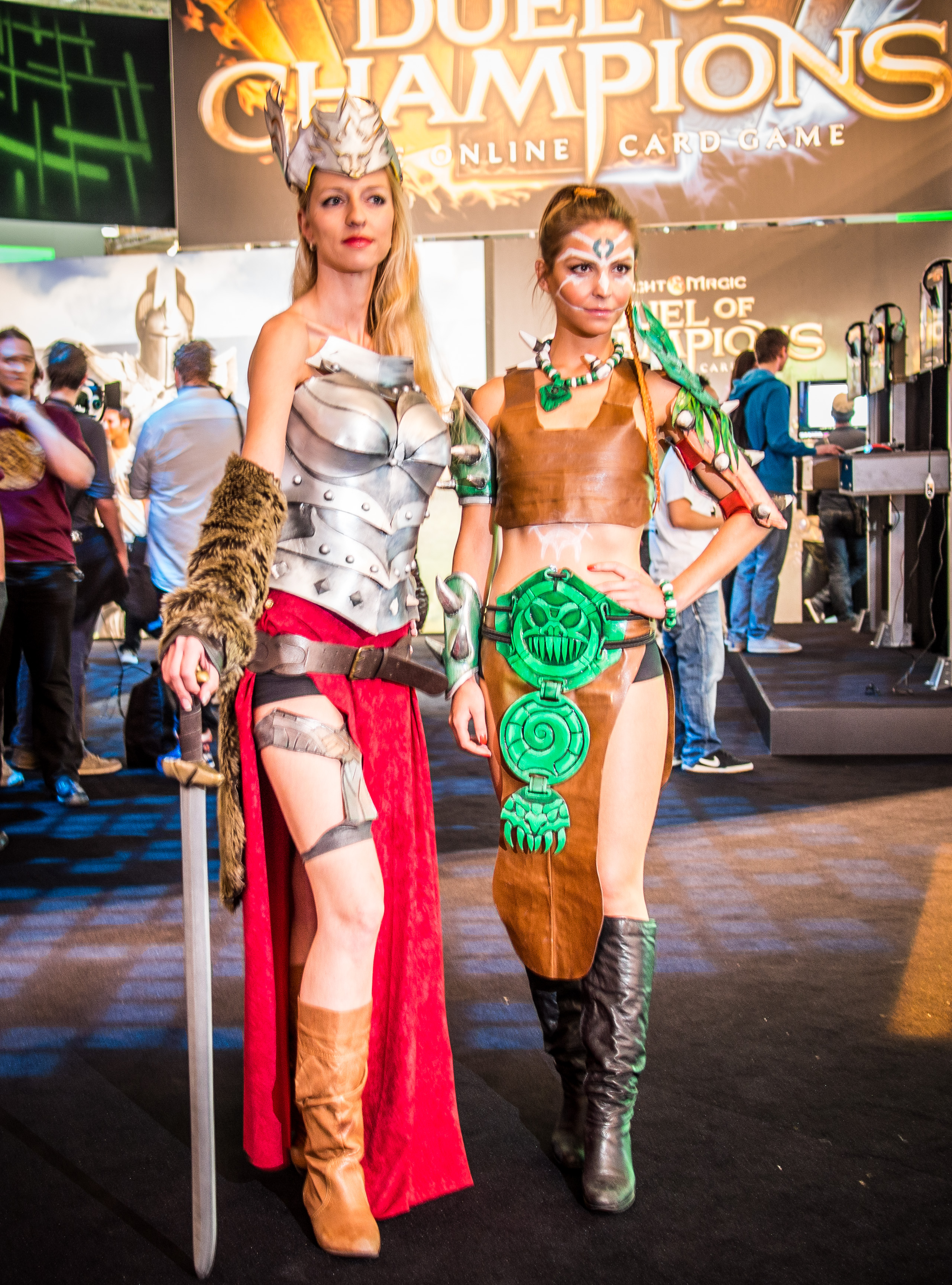 Gamescom expo, Cologne, Germany